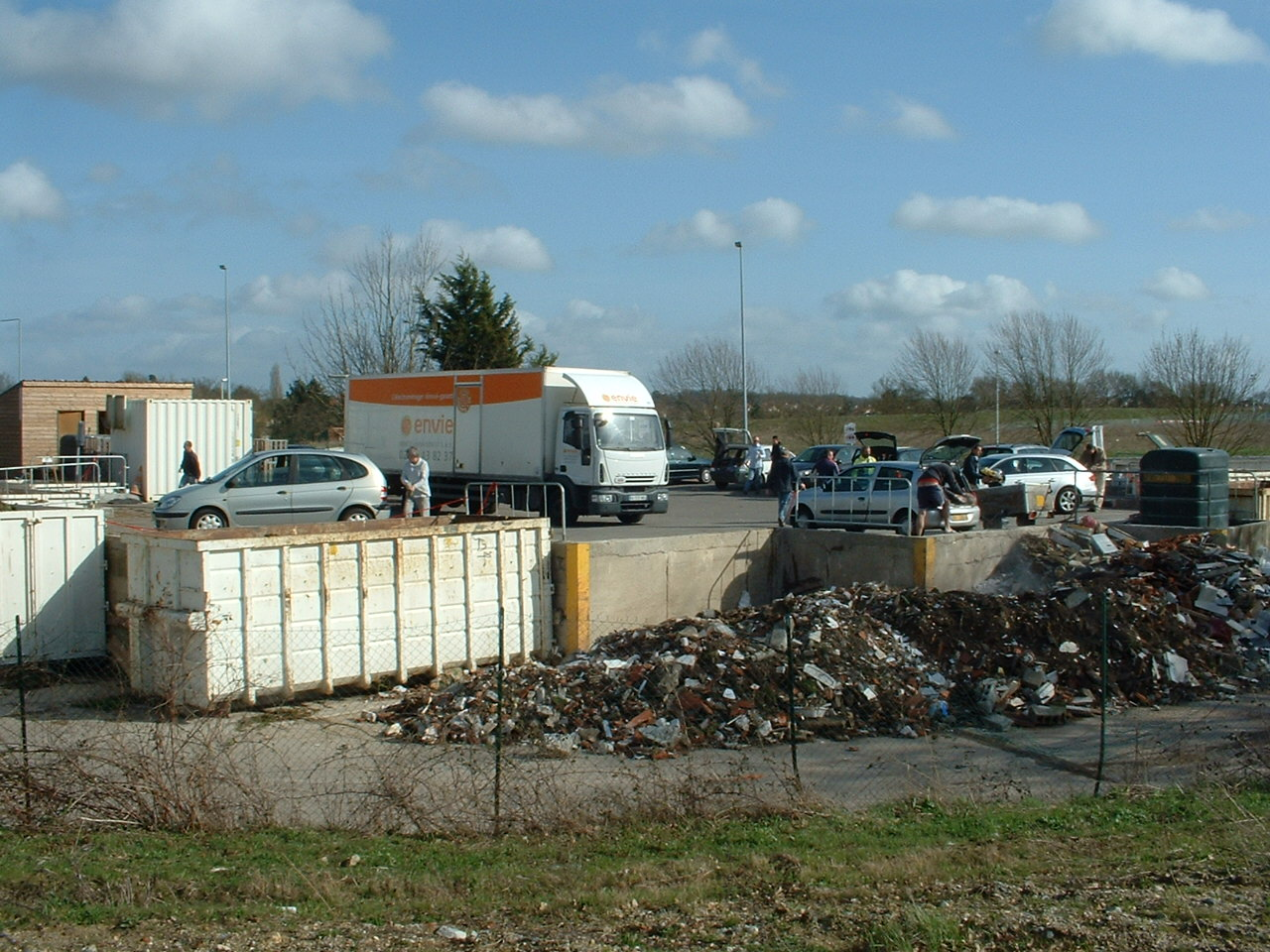 Rezé (France) - Déchèterie, tri sélectif, aire de récupération des déchets non collectés en porte-à-porte